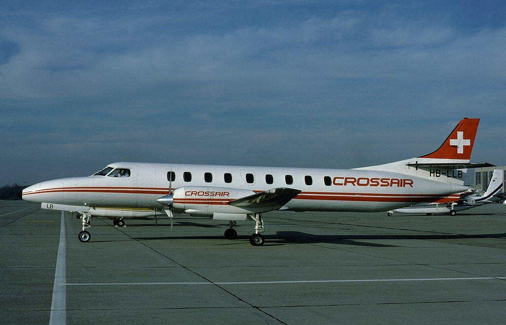 Swearingen SA 226TC / II Metroliner der Crossair am Flughafen Basel-Mülhausen